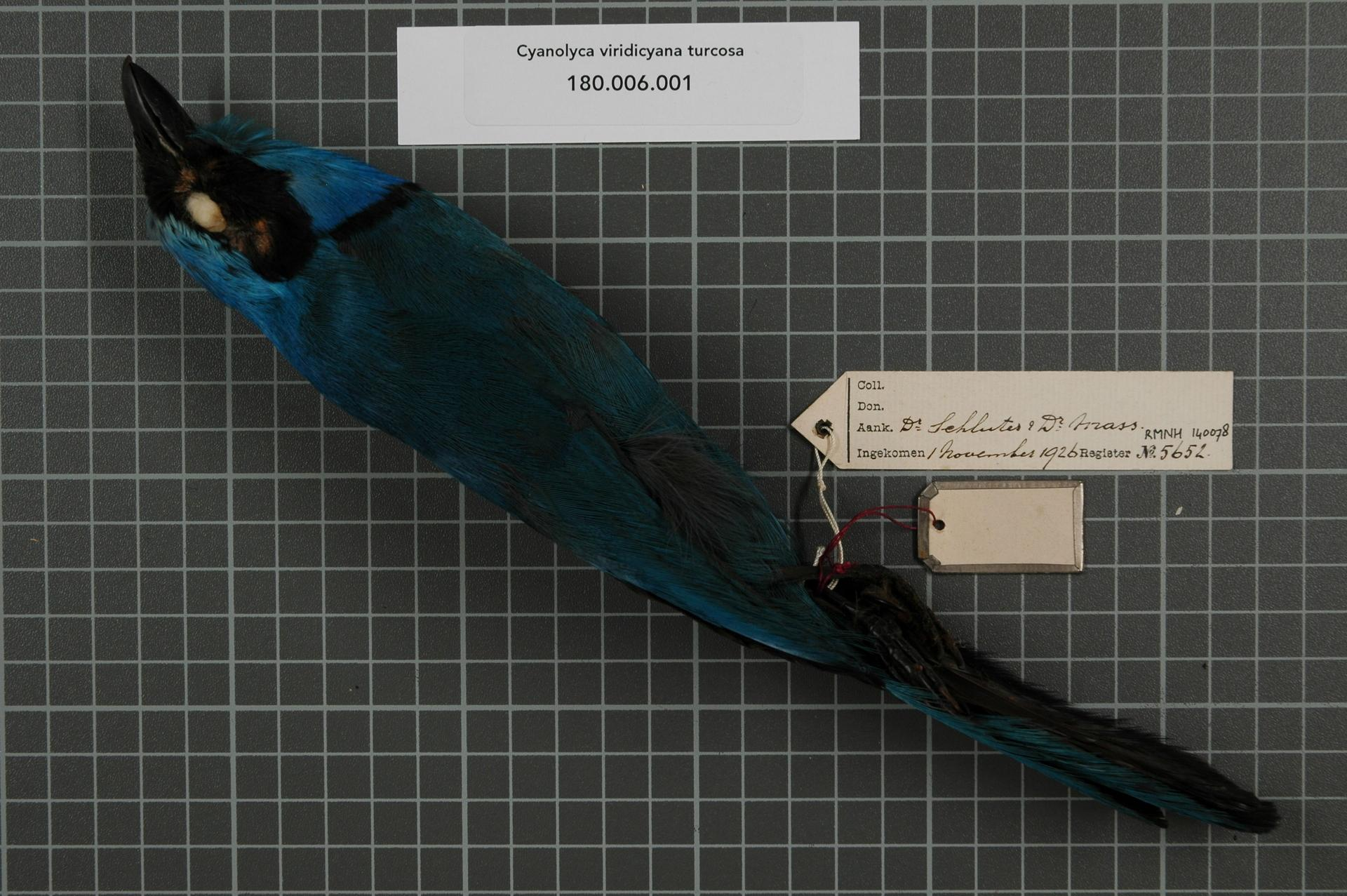 Cyanolyca viridicyana turcosa (Bonaparte, 1853)